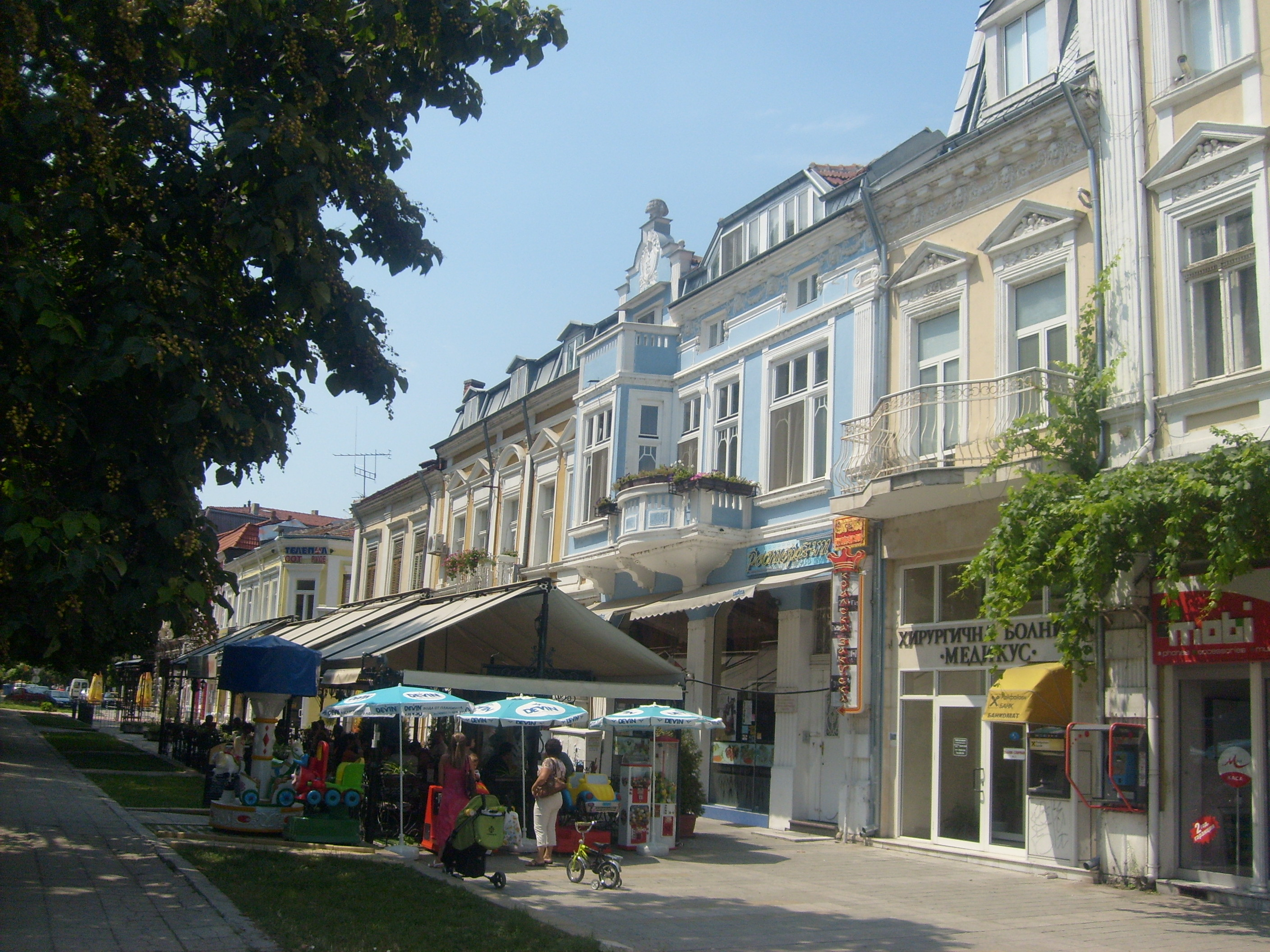 Ruse, Bulgaria